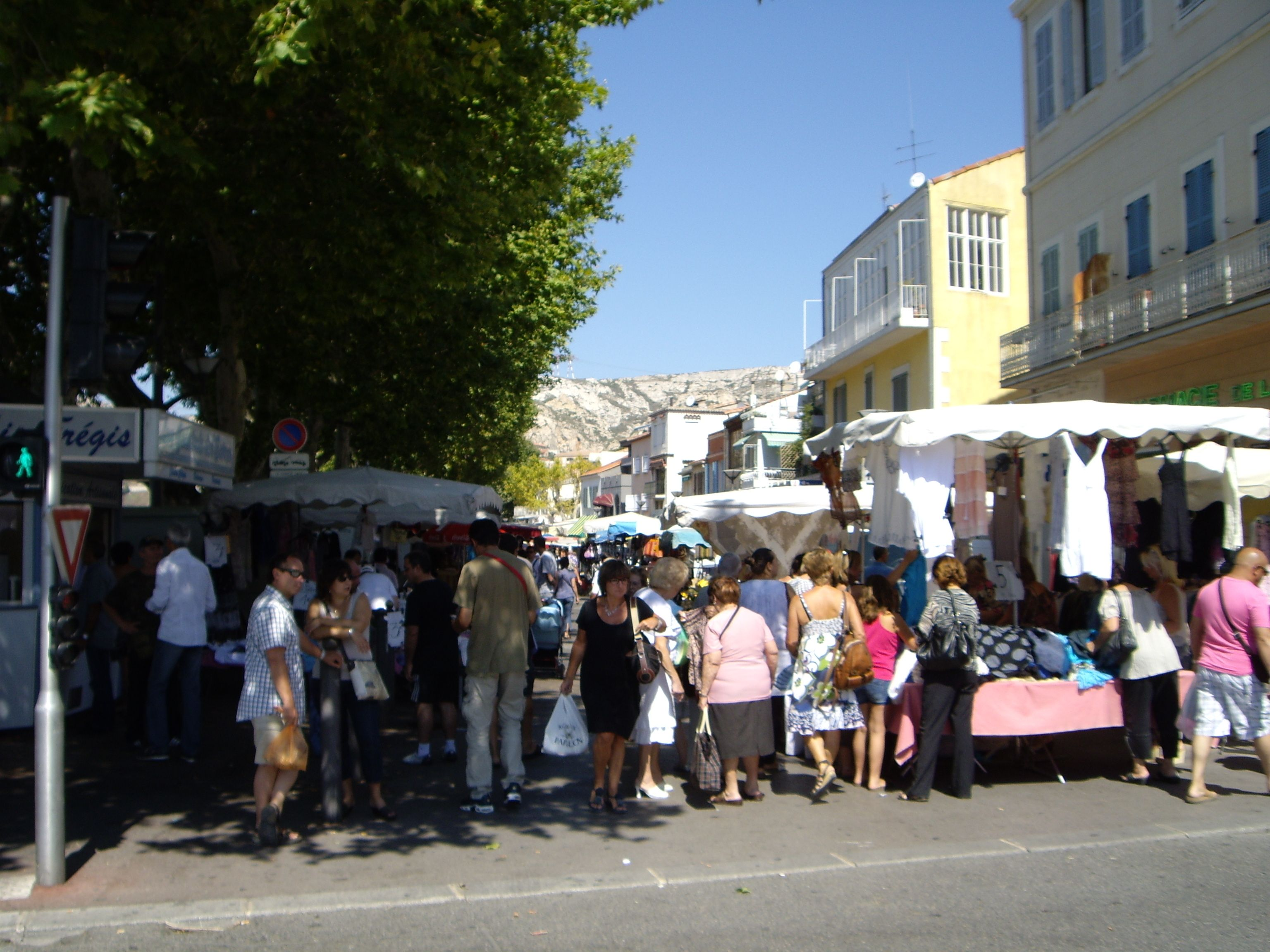 Marché à L'Estaque